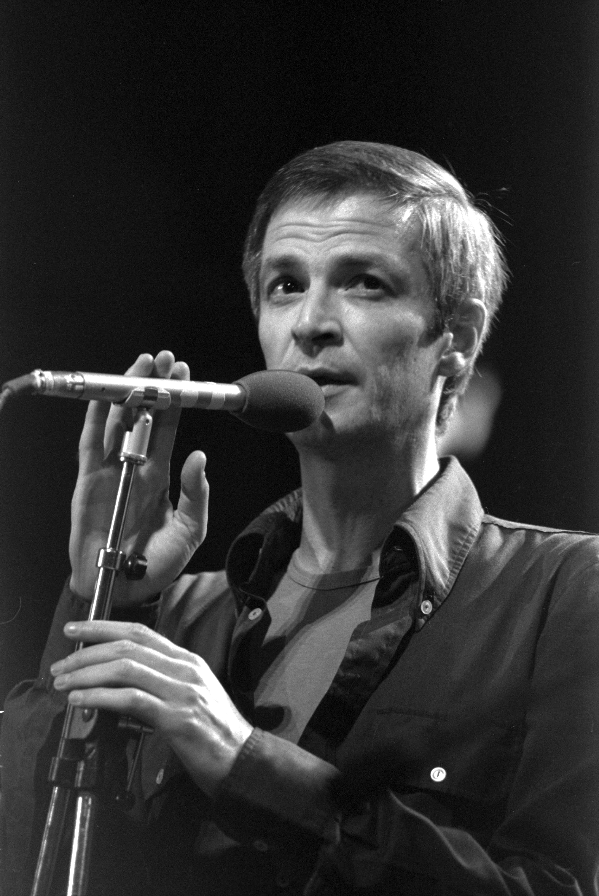 אריק איינשטיין בהופעה